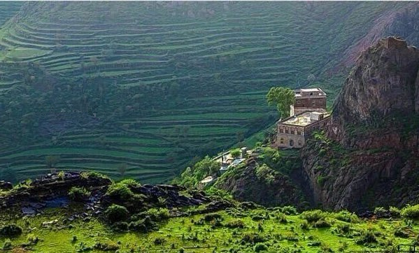 صورة من مديرية رازح في صعدة